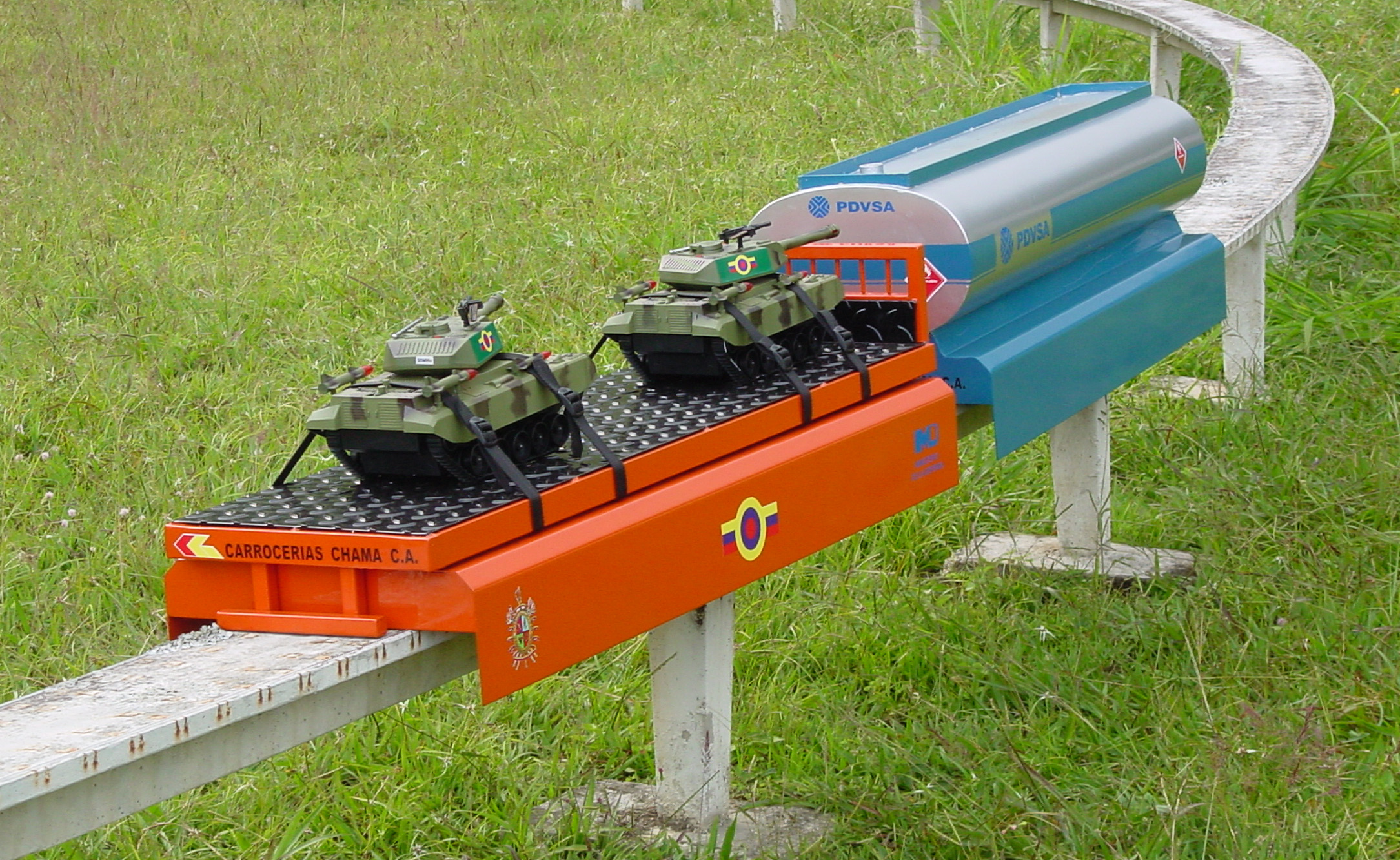 Carrocerías de carga para el Prototipo 7 del TELMAGV